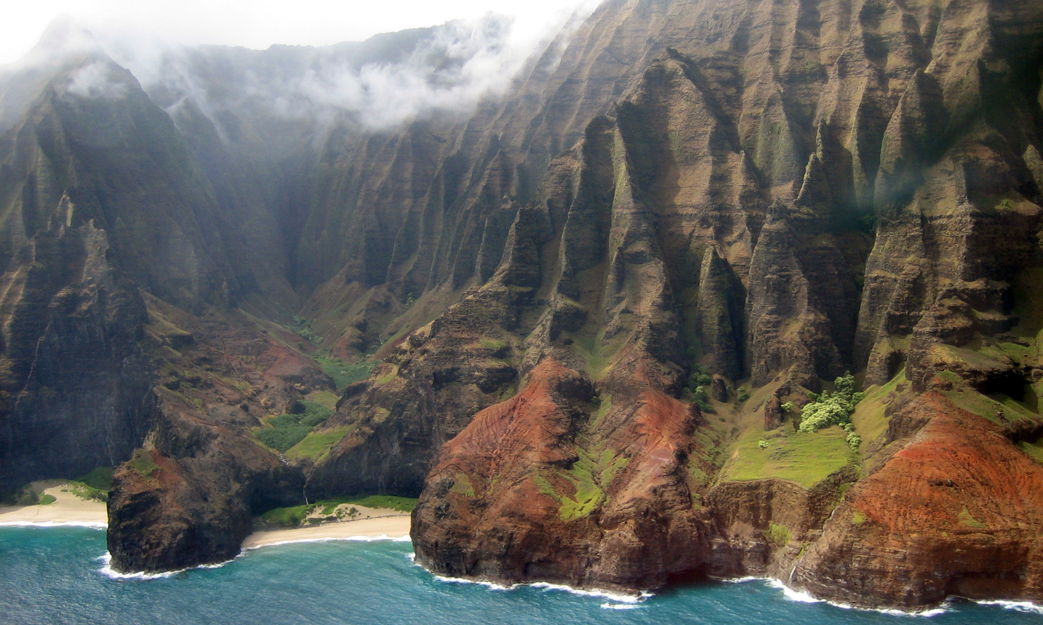 Na Pali-kysten.